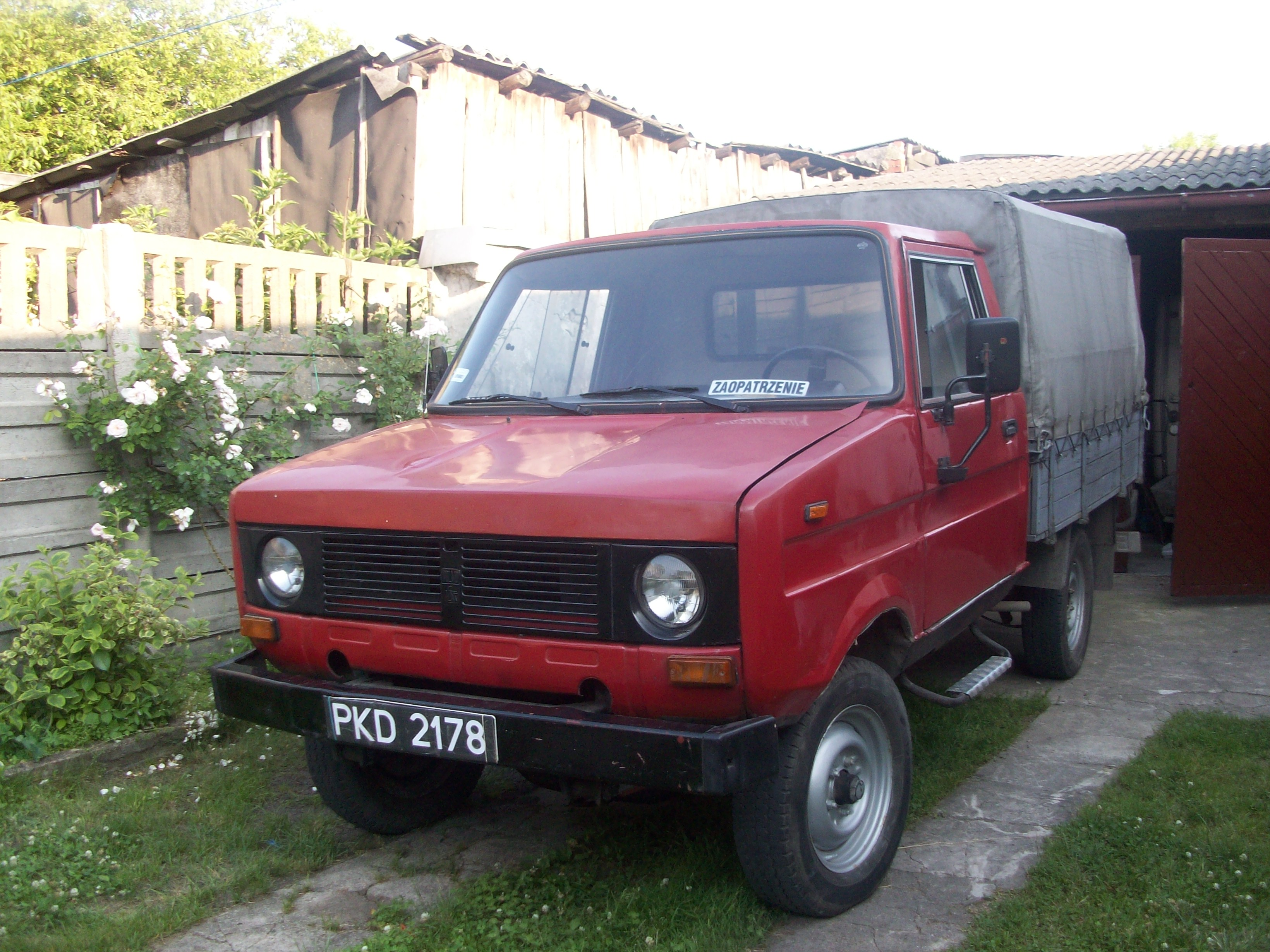 FSR Tarpan 239D z 1990 roku